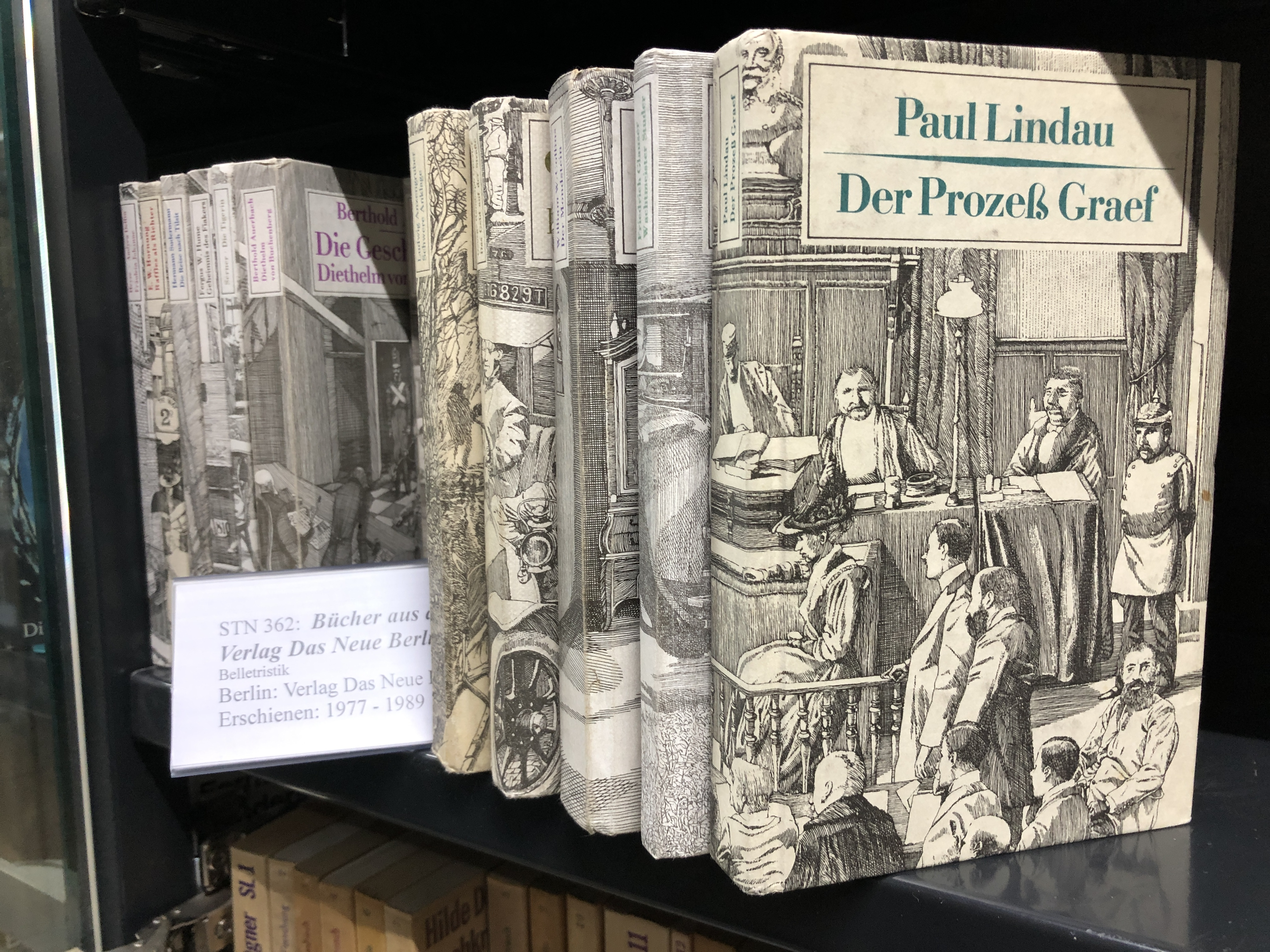 Abbildung des Buches "Der Prozeß Graef" von Paul Lindau, 1985. Es ist Teil der Sammlung Neumann in der Universitätsbibliothek Magdeburg.